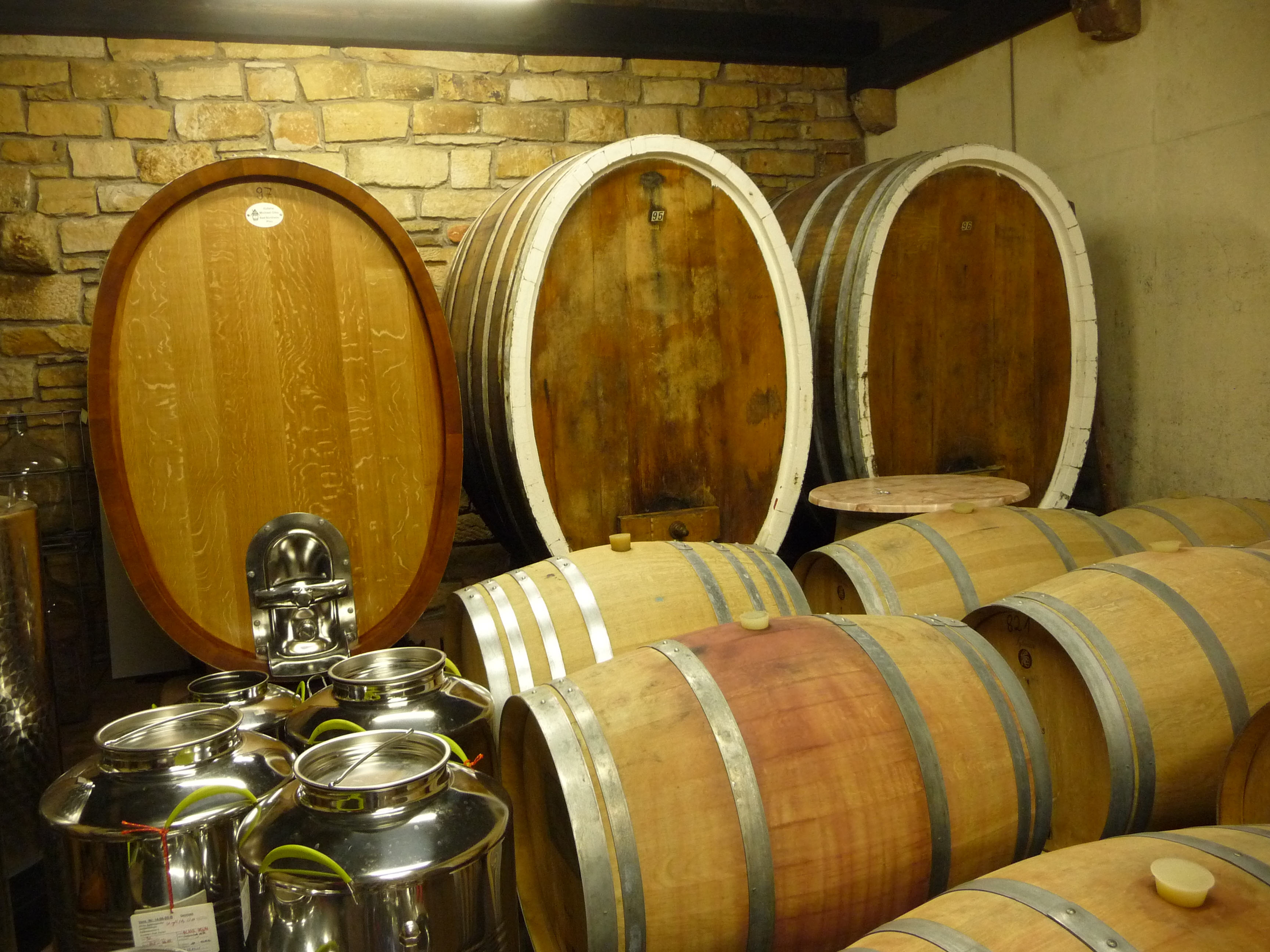 Dienstleistungszentrum Ländlicher Raum, früher Forschungsanstalt für Weinbau und Gartenbau bei Neustadt an der Weinstraße